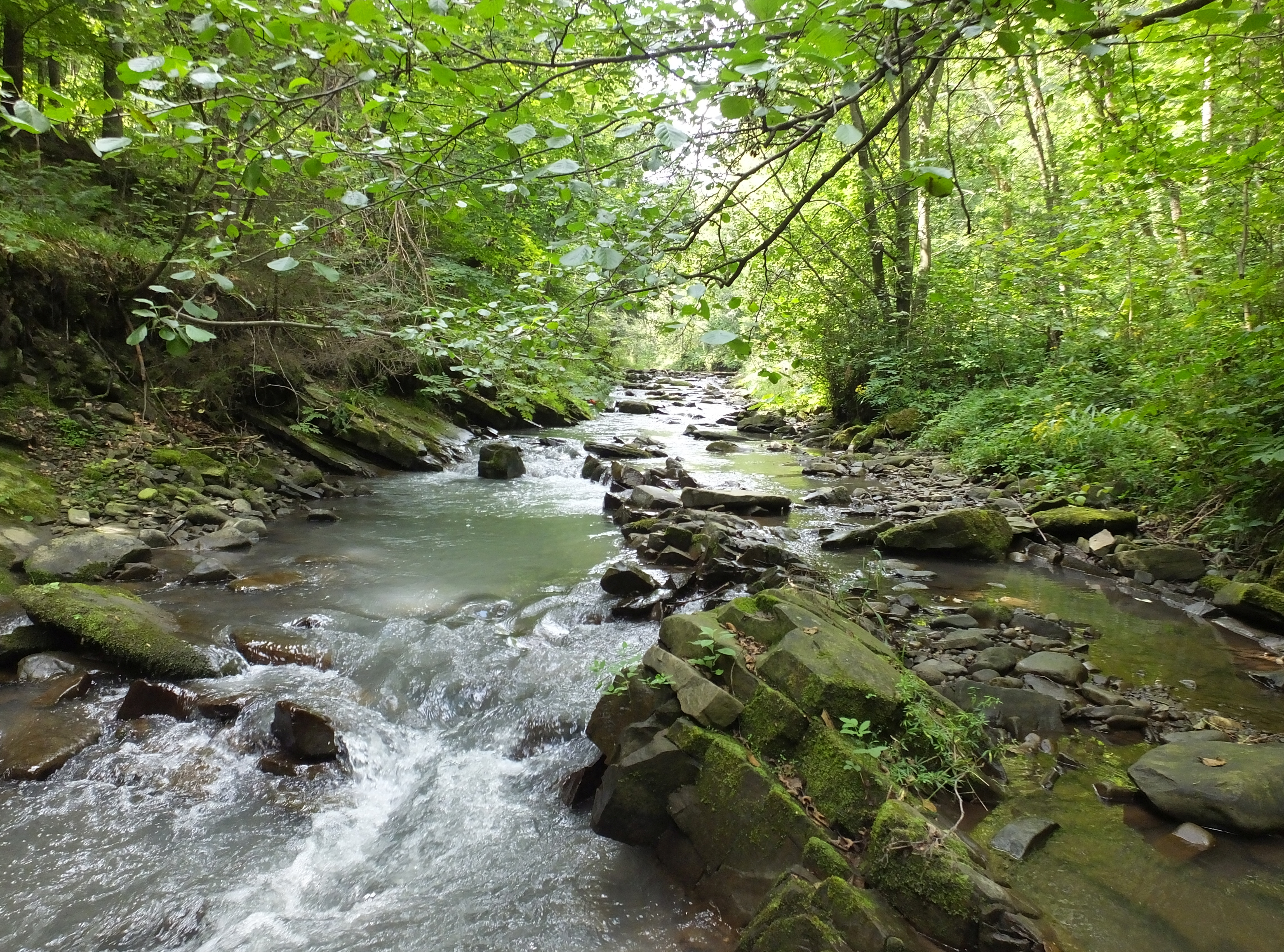 Struga Leśnianka w lesie koło Ostrego. Park Krajobrazowy Beskidu Śląskiego This is a photography of protected area with CRFOP ID PL.ZIPOP.1393.PK.18